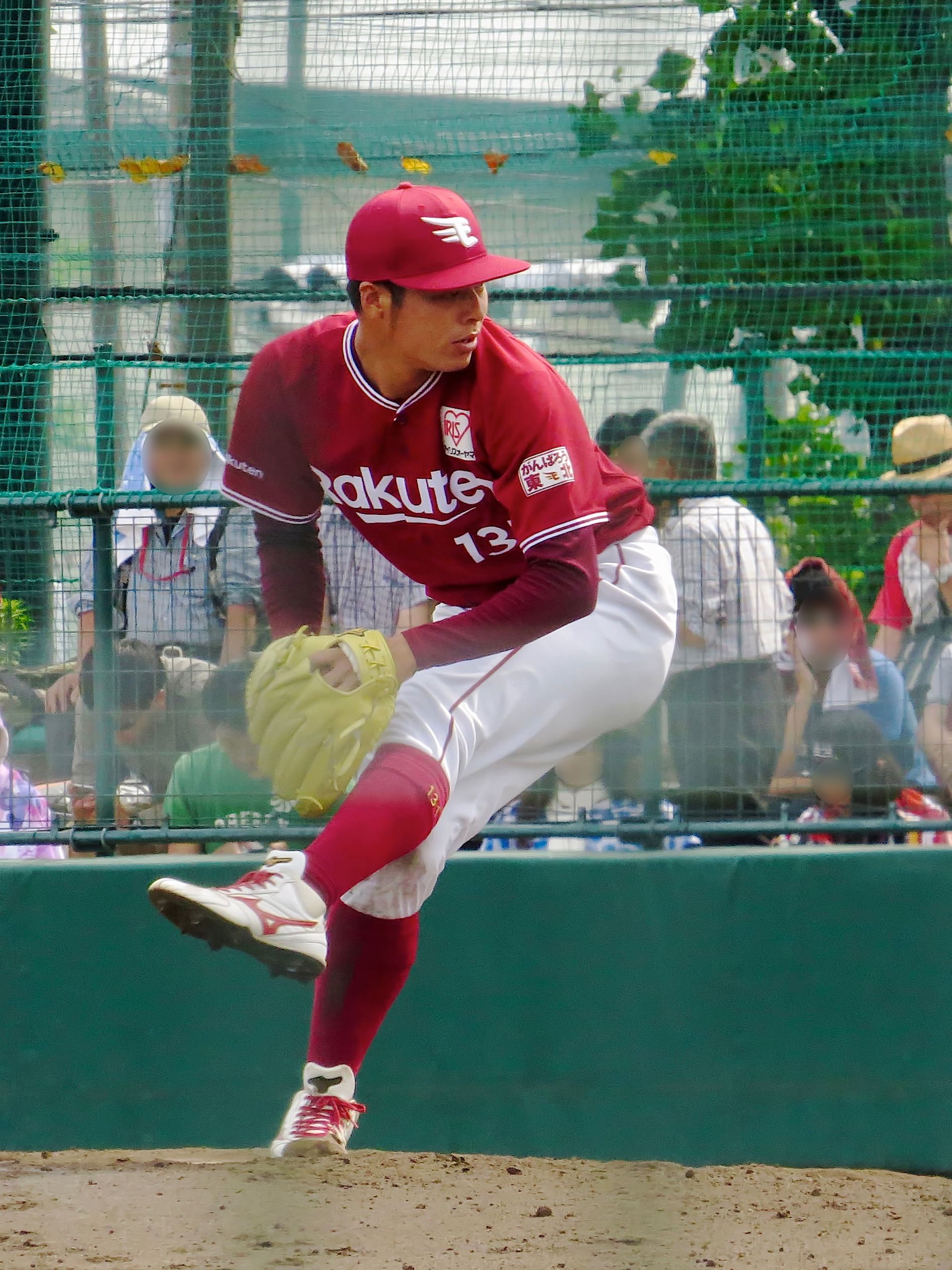 東北楽天ゴールデンイーグルスの選手。ロッテ浦和球場にて。